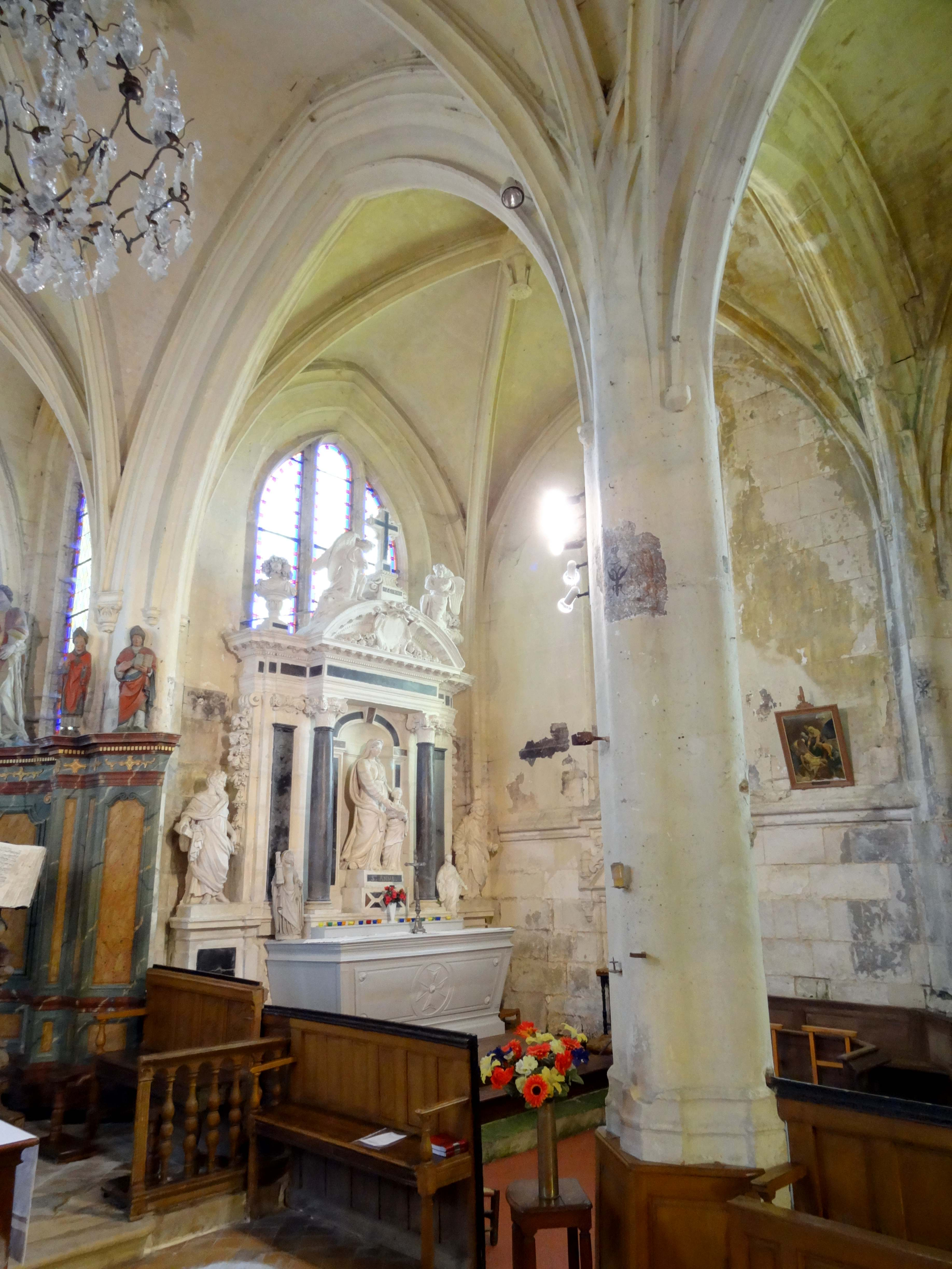 Intérieur de l'église - voir titre.